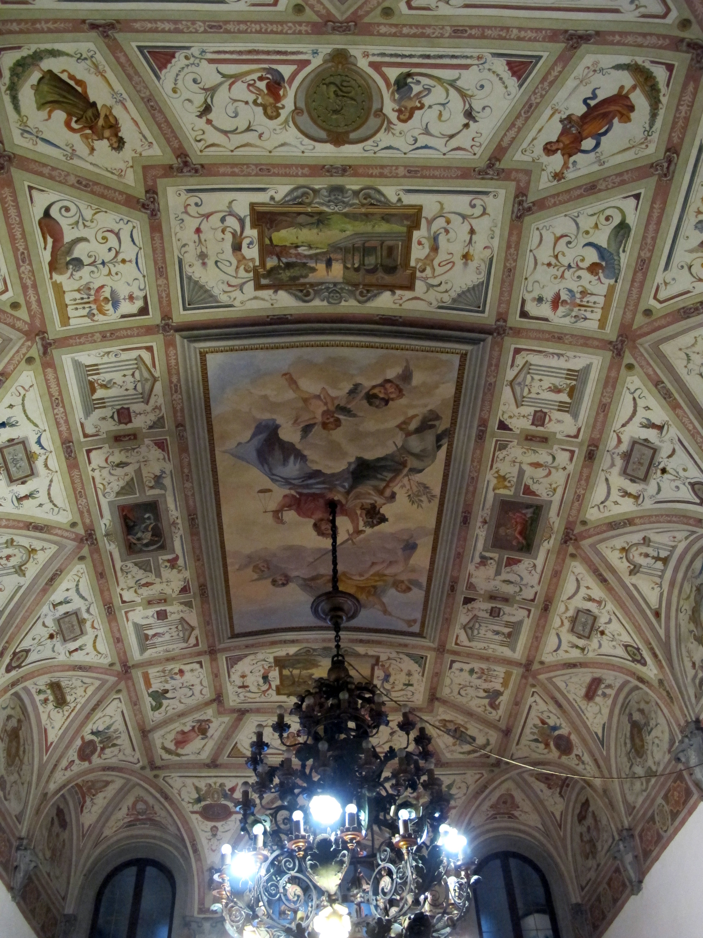 Palazzo di San Clemente, Firenze